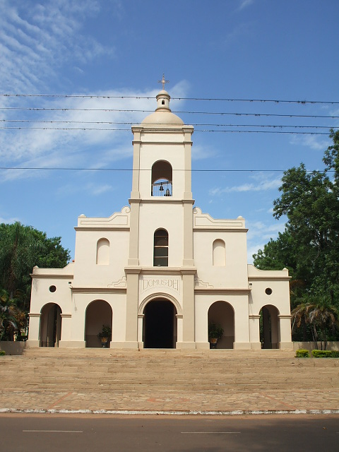 Iglesia